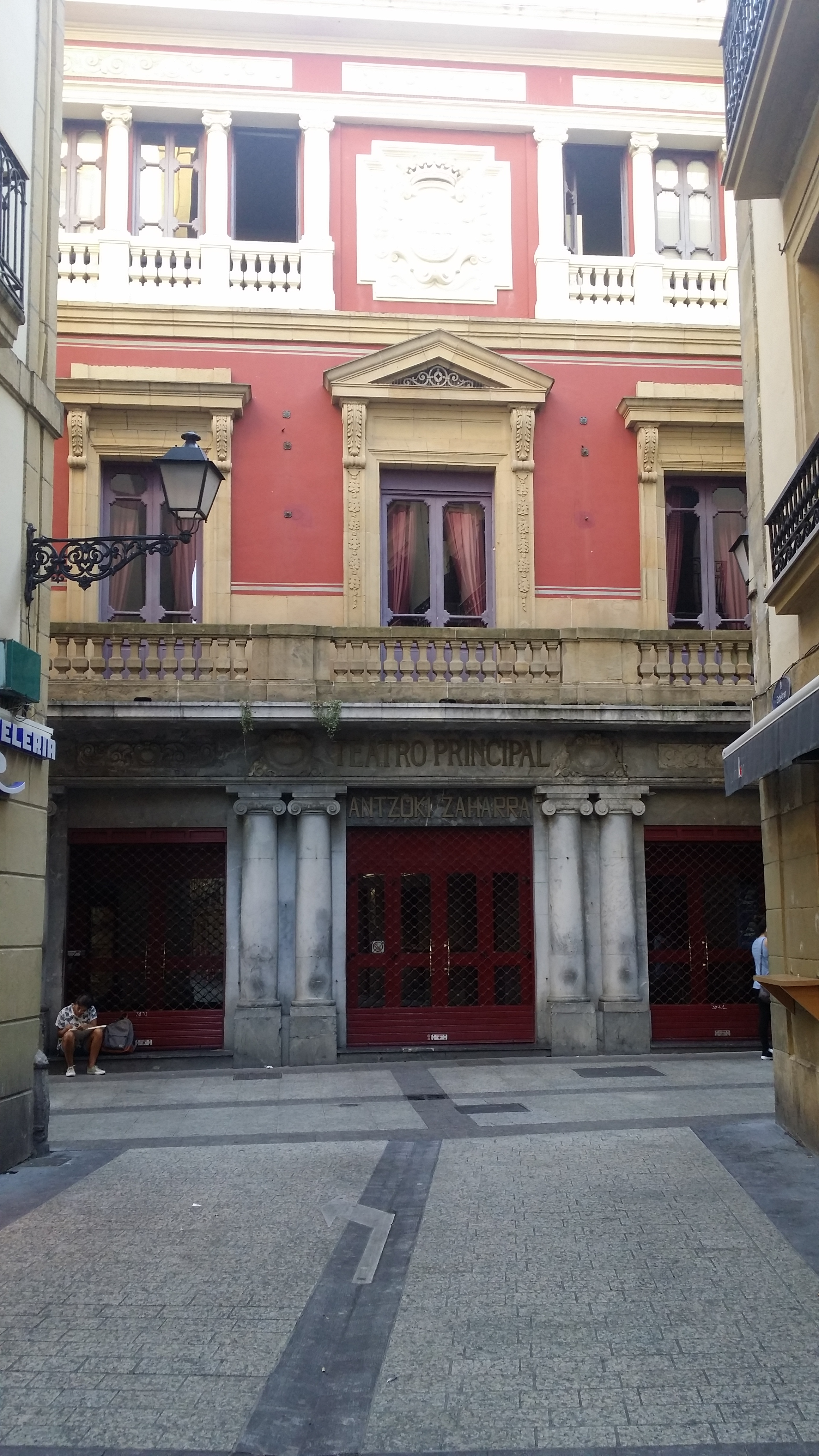 Donostiako Antzoki Zaharra